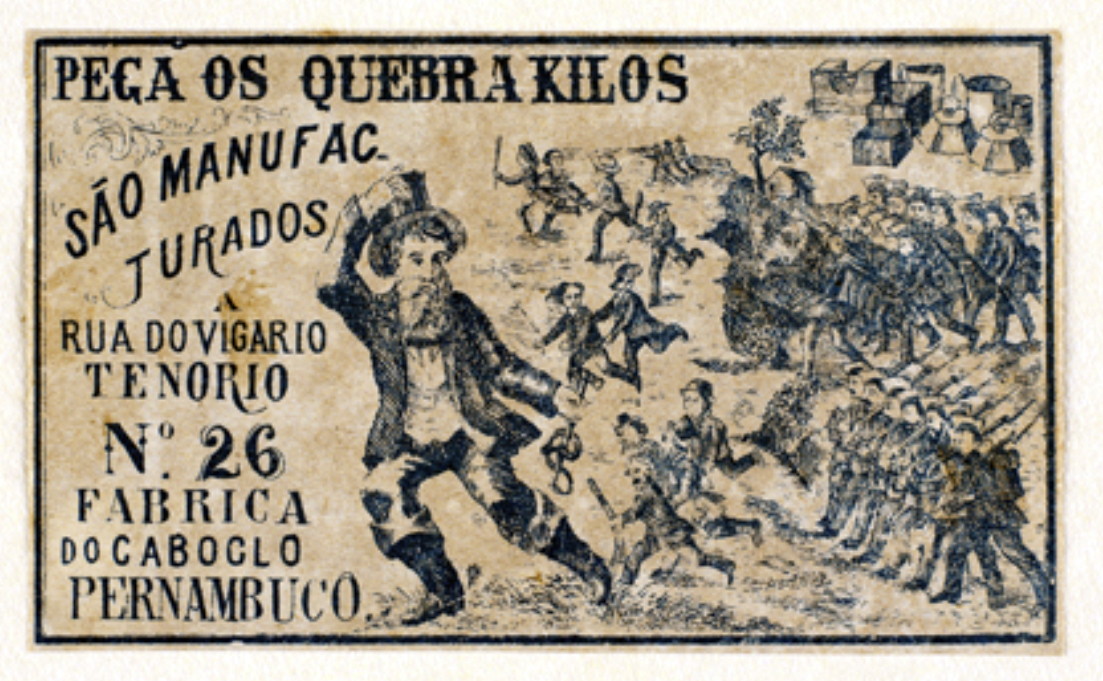 "Pega os Quebra-Kilos", marca de cigarros, Recife (Pernambuco, Brasil), 1875.